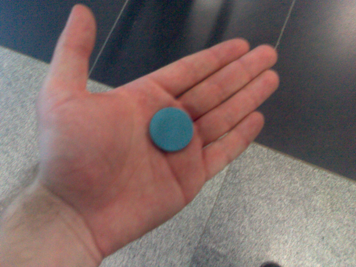 Žeton z metra v Dillí, Indie